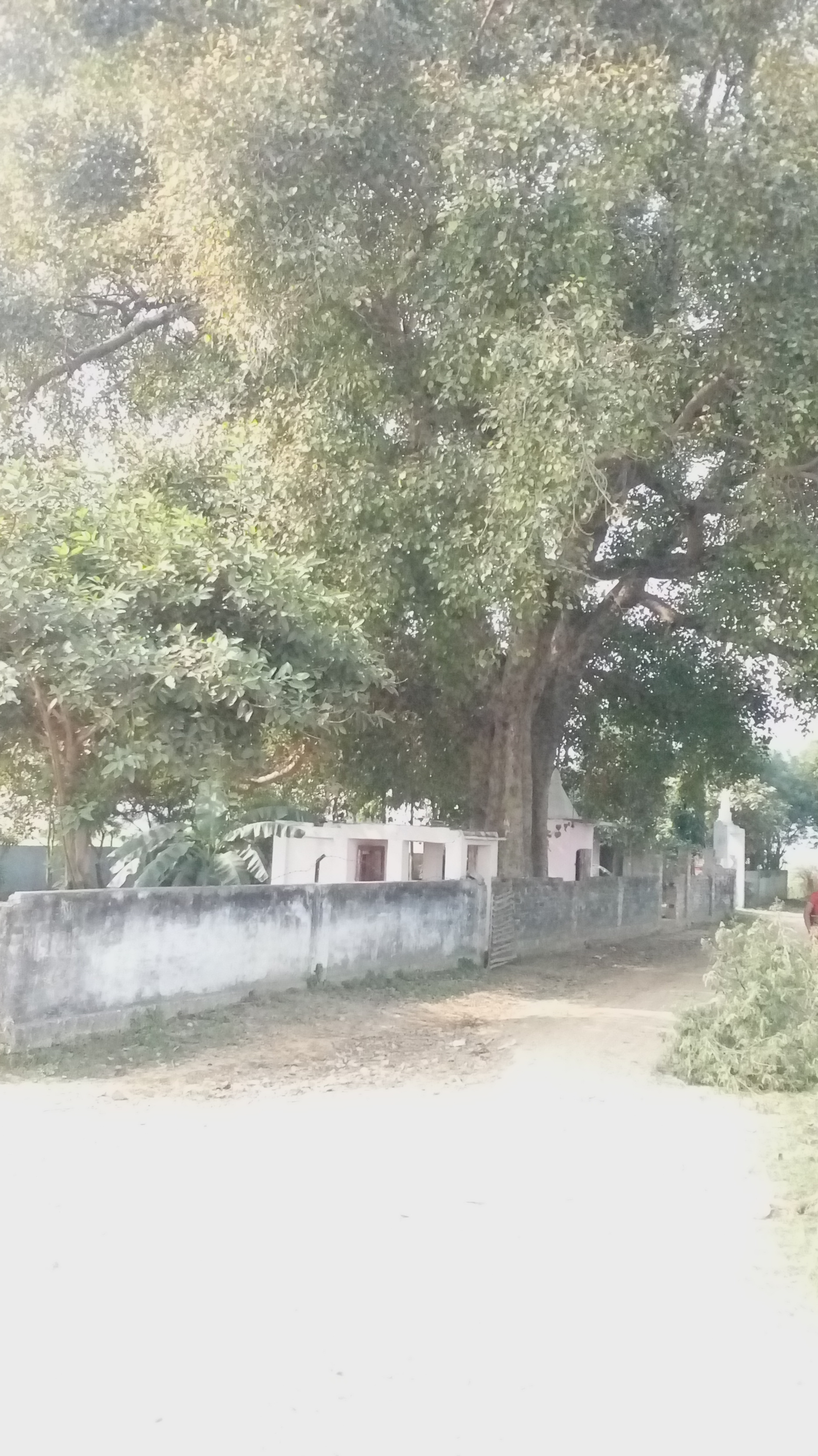 हनुमान मंदिर गंगा किनारे